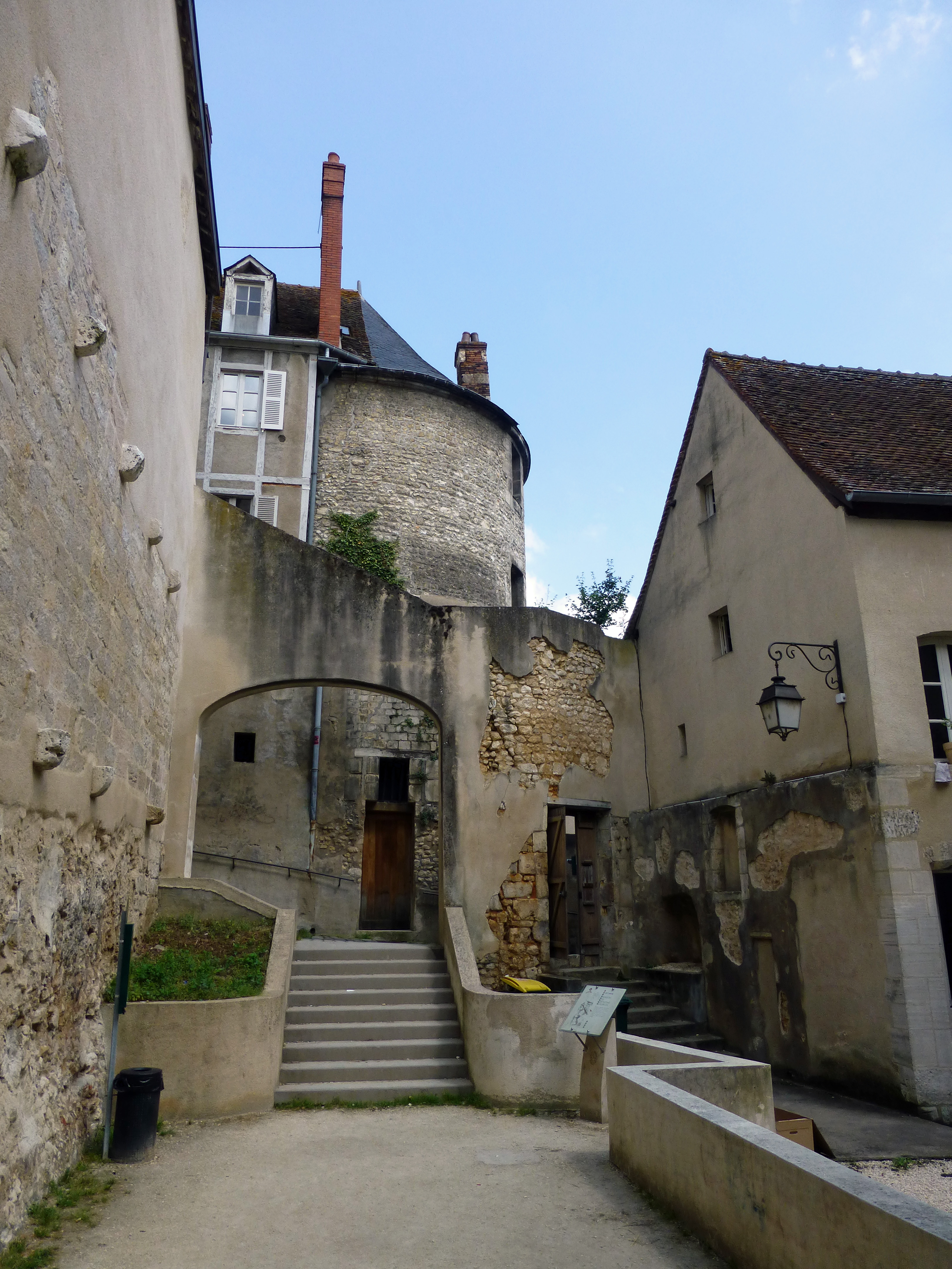 Bourges (Cher) : remparts gallo-romains